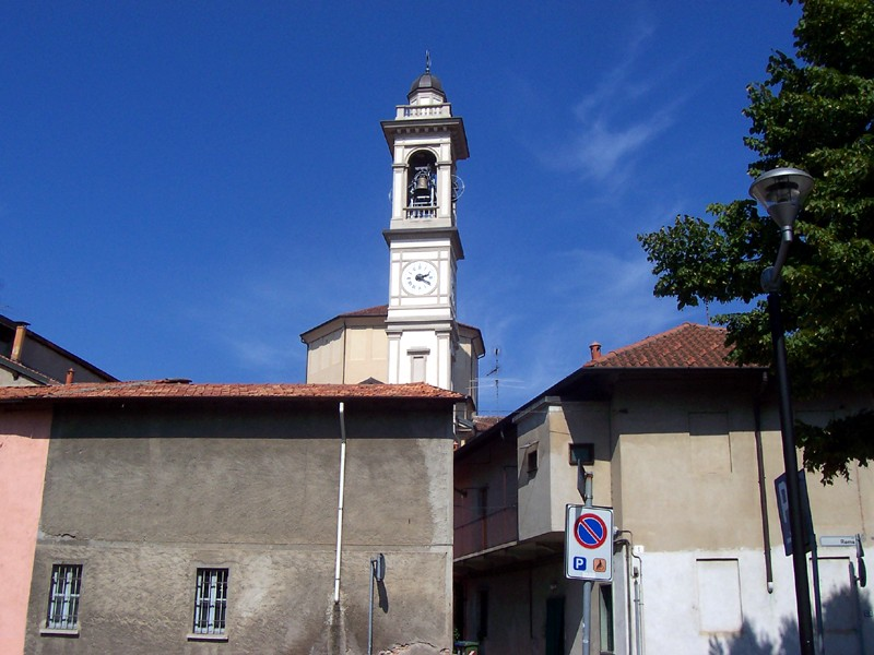 Masate - Chiesa Parrocchiale di S. Giovanni Evangelista